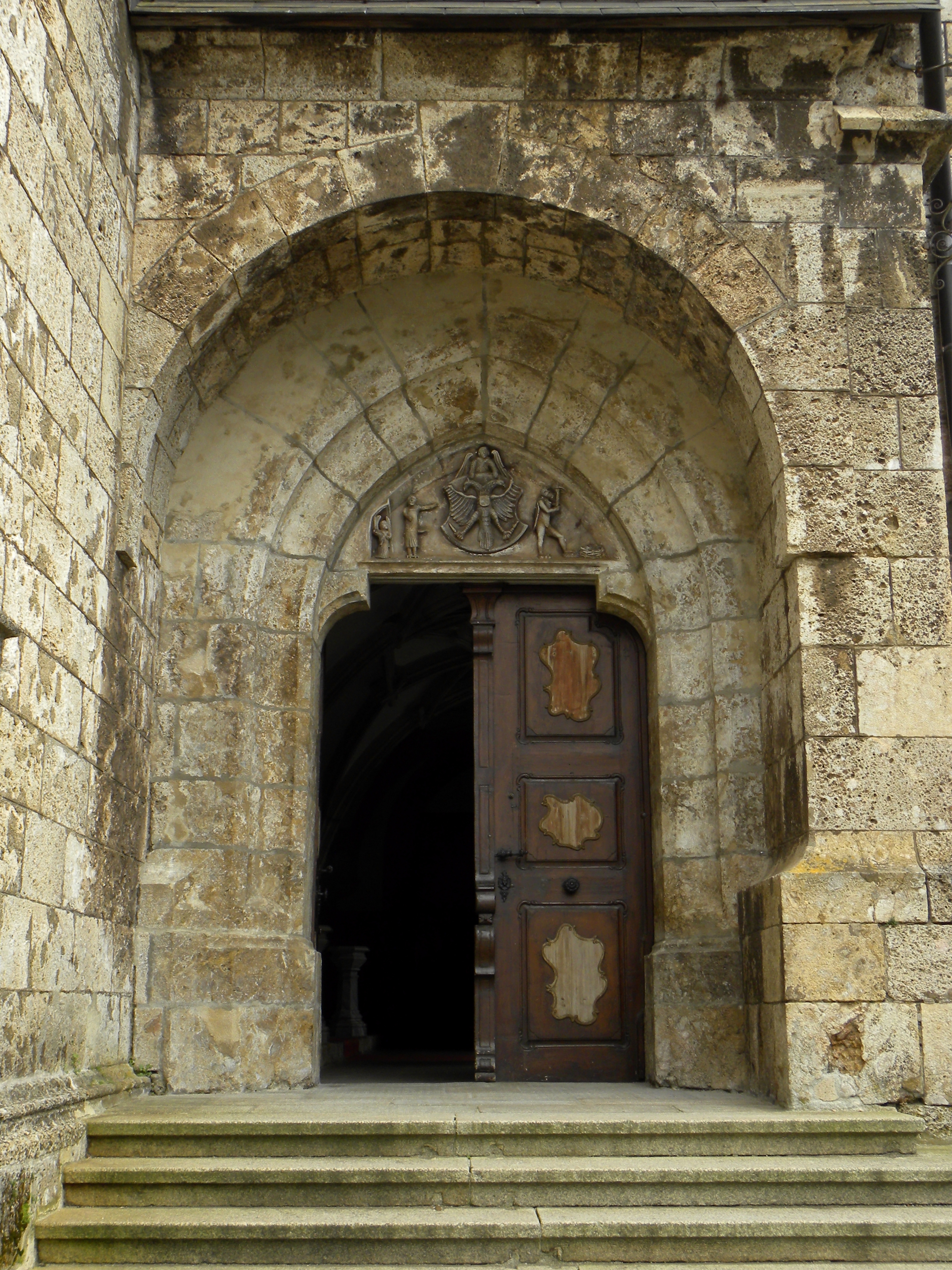 Kirchenfestungsanlage hl. Oswald - Eingang Nordportal